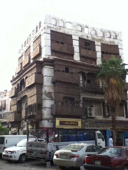 Traditionelle Architektur, Altstadt Dschidda